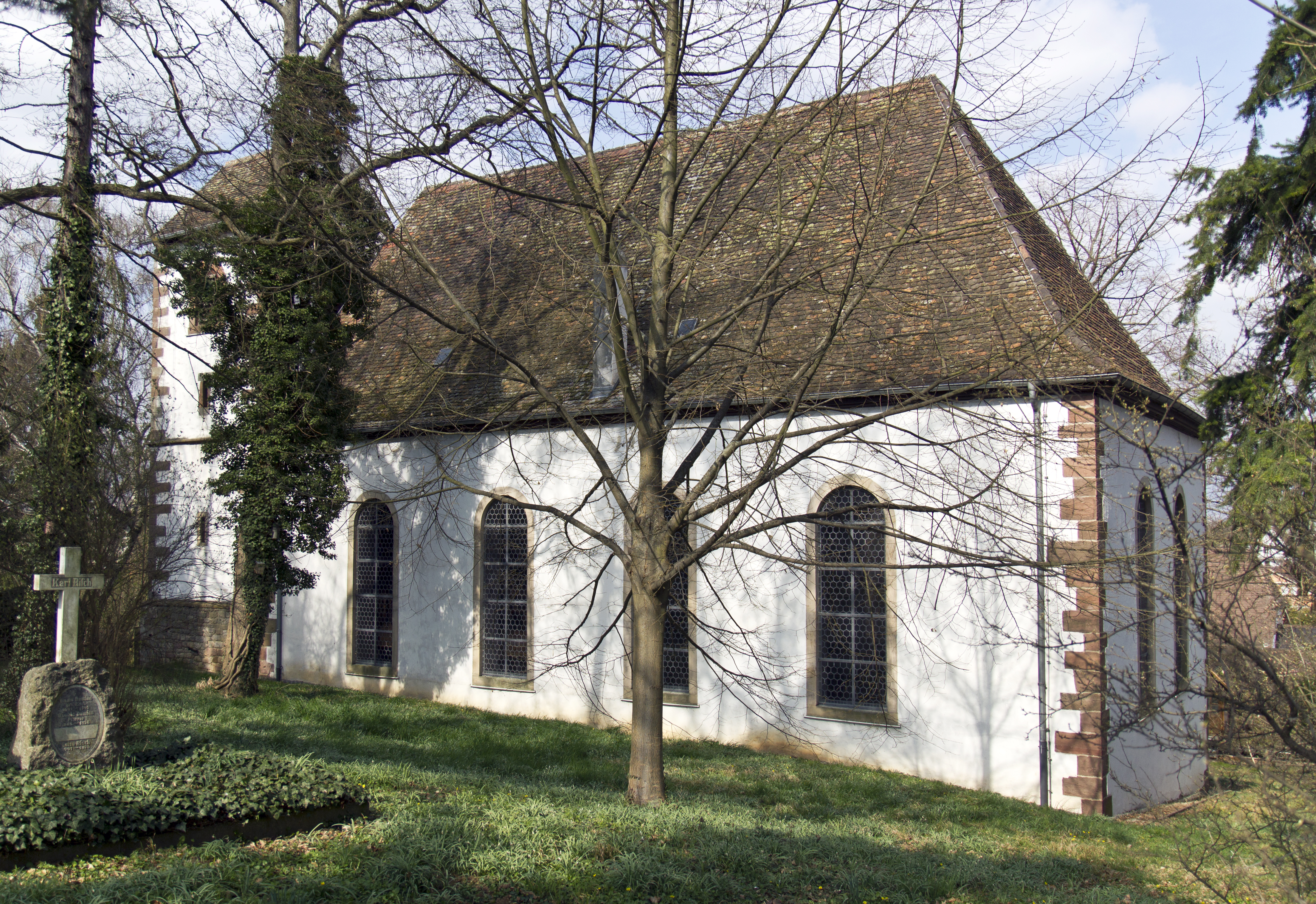 Walsheim, Protestantische Pfarrkirche, ehemals St. Peter; spätgotischer Turm, bezeichnet 1723, Saalbau, 1810–12